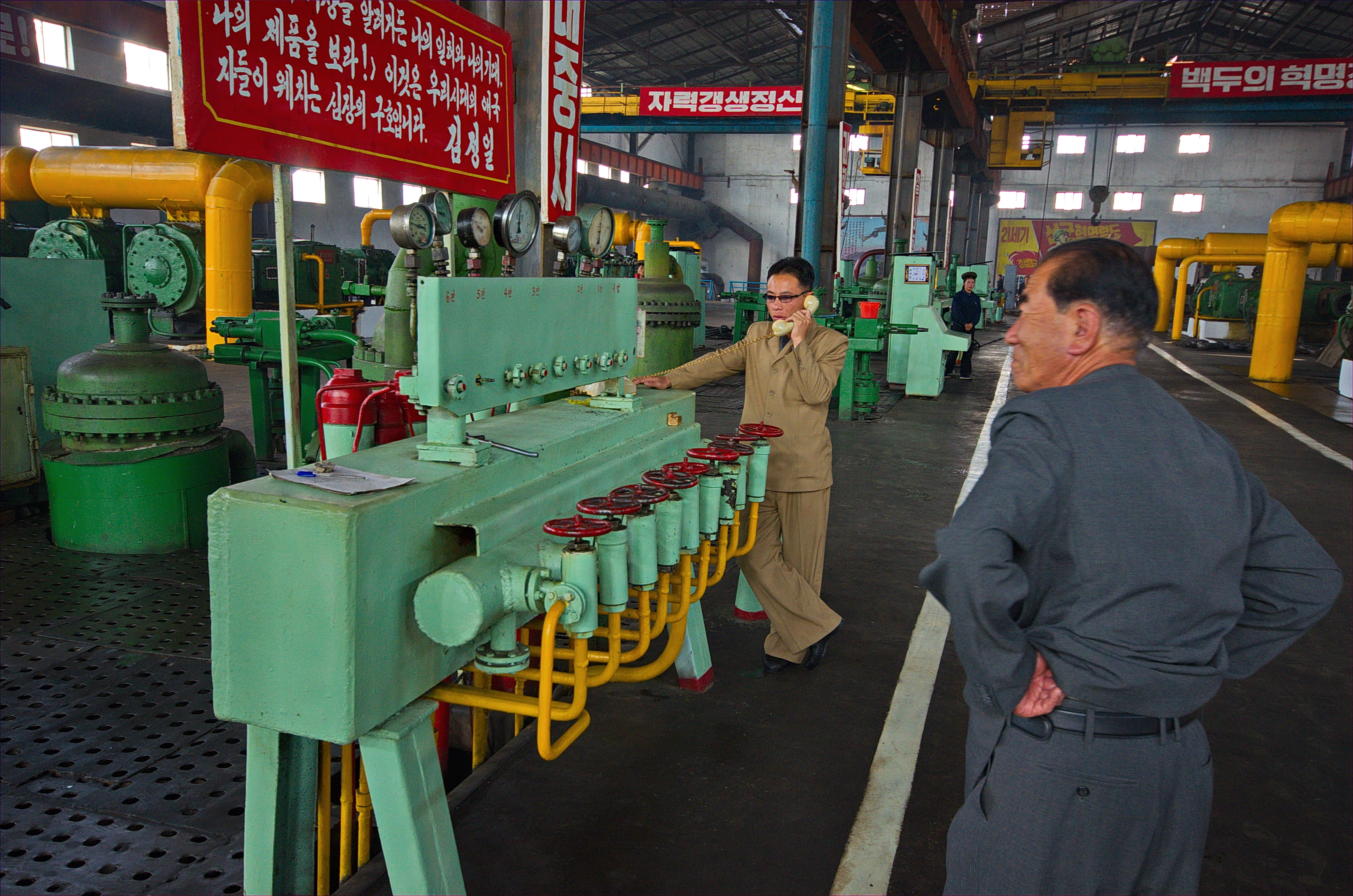 Nordkorea 2015 - Hamhung - Düngemittelfabrik